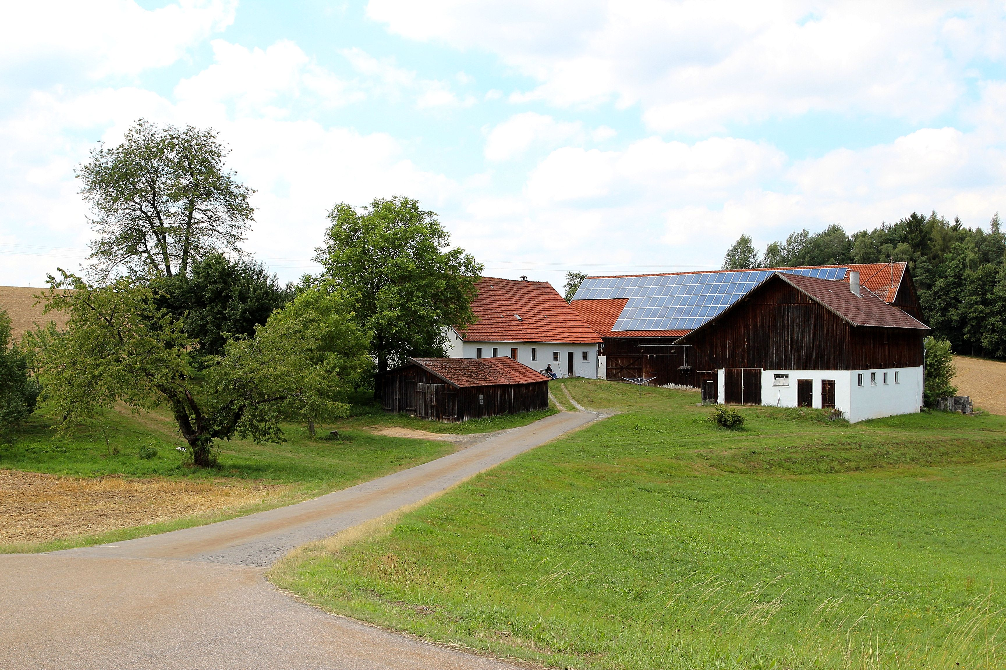 Holmbrunn ist ein Ortsteil der Gemeinde Niedermurach im Oberpfälzer Landkreis Schwandorf in Bayern.